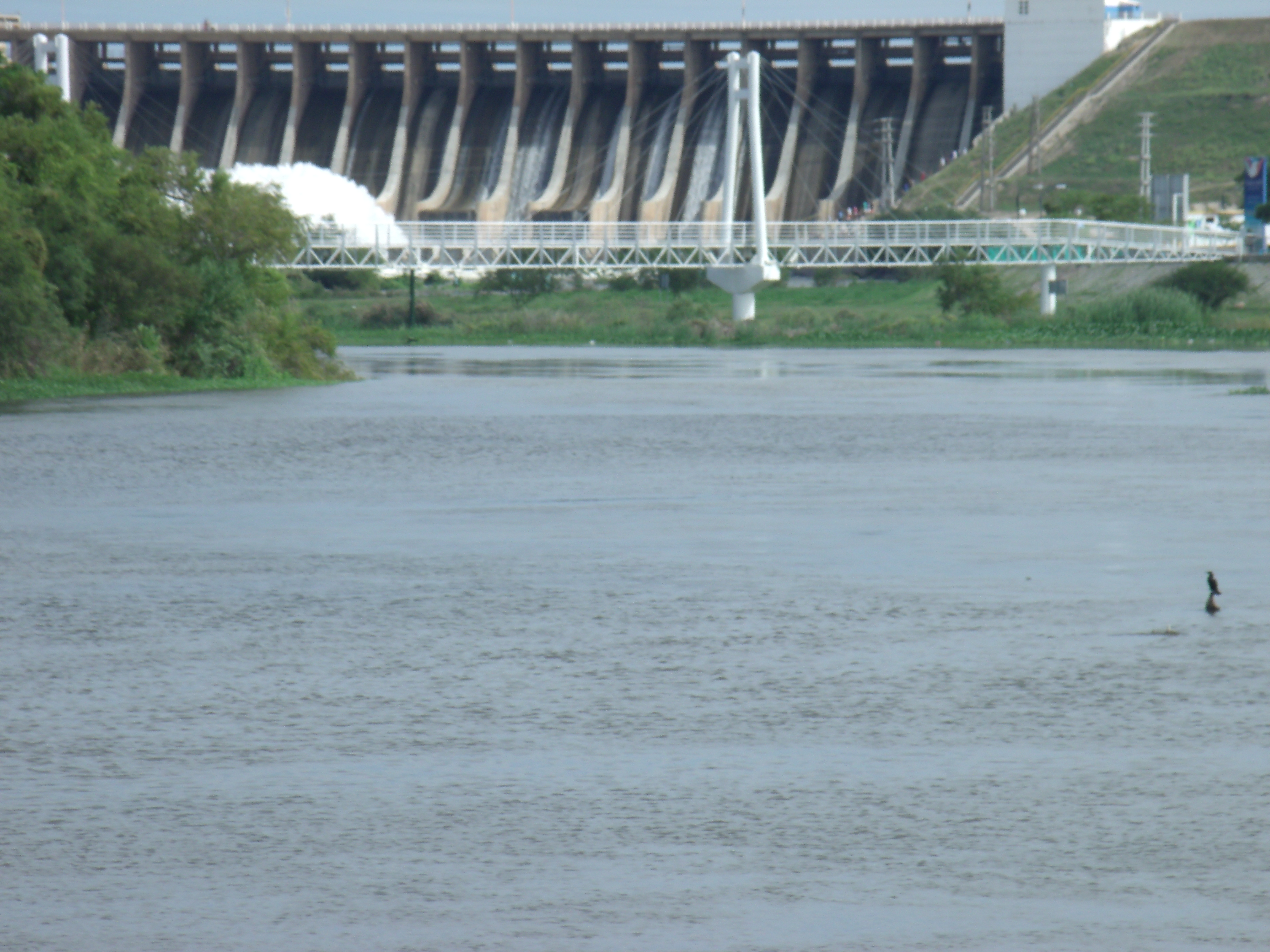 Dique Frontal del Embalse de Río Hondo desde la Costanera